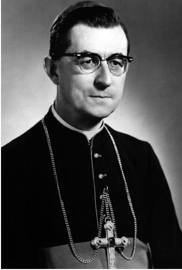 primeiro bispo de londrina